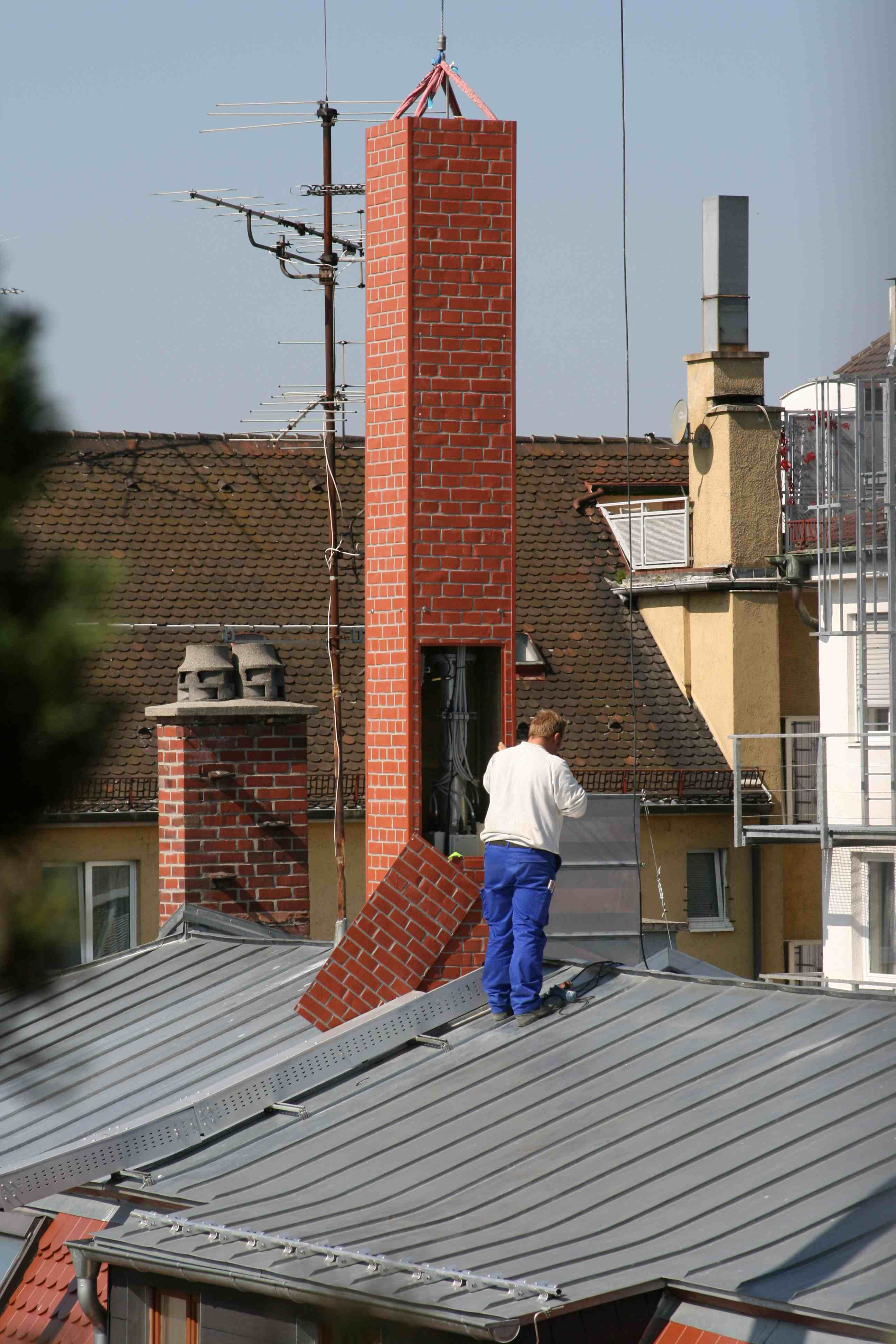 Tarnung eines Sendemasts